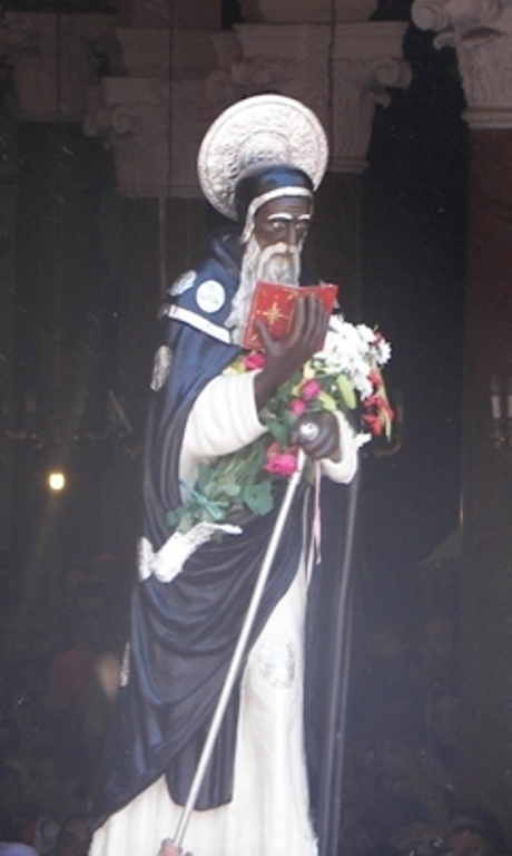 Statua di San Calogero ad Agrigento.